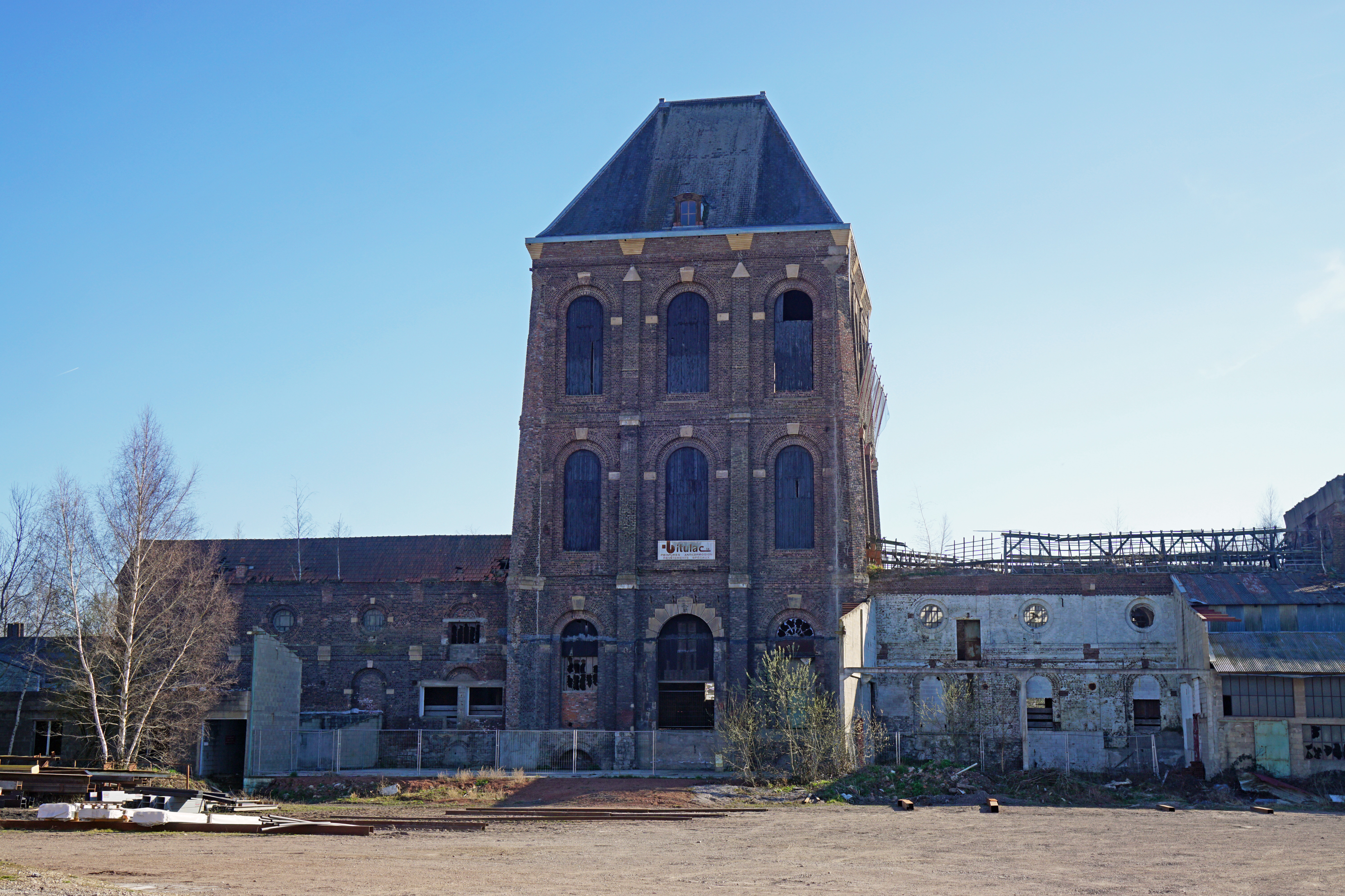 La tour malakoff (bâtiment d'extraction) du Puits Hottinguer (Houillères d'Épinac).